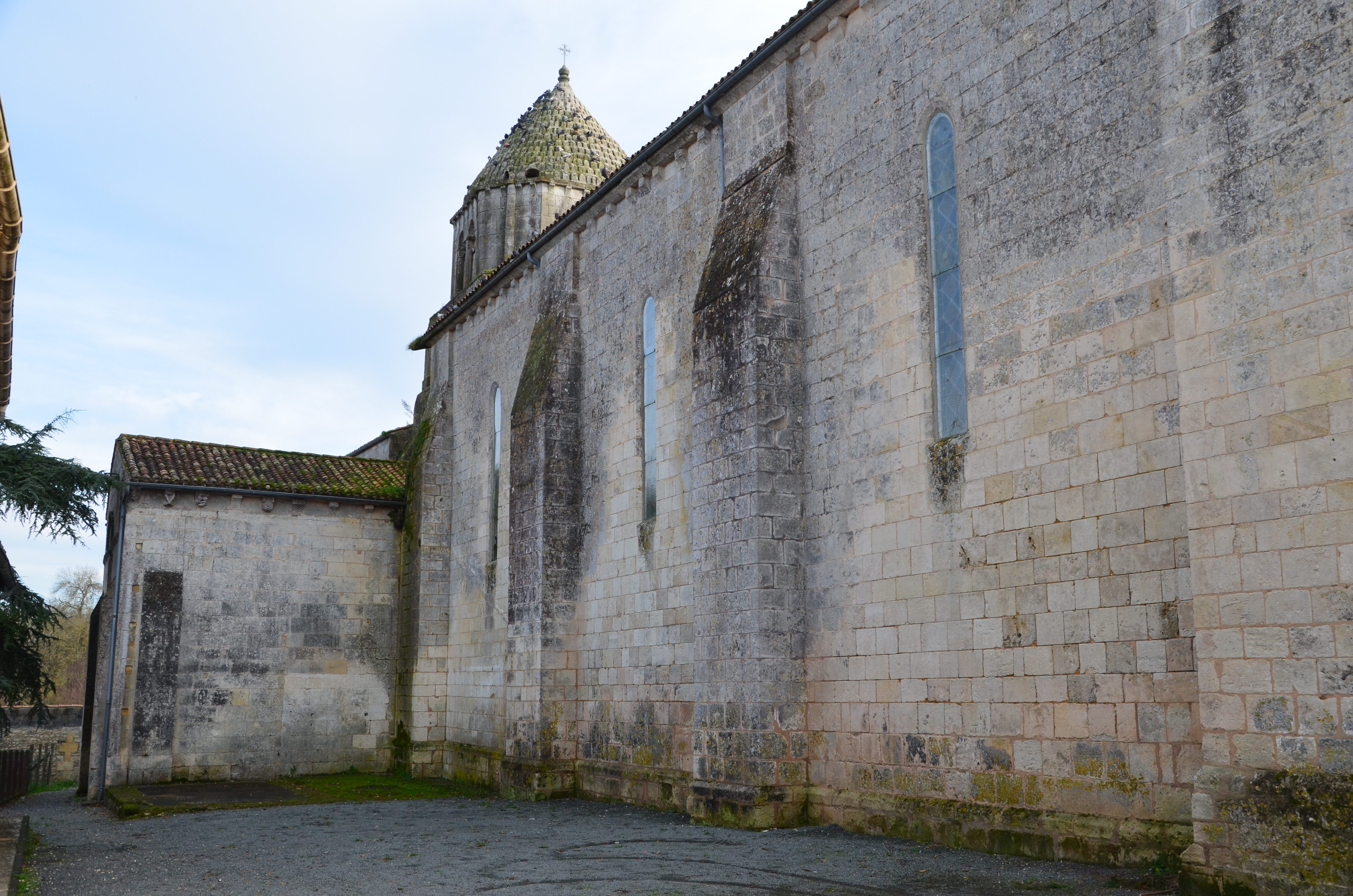 aile nord